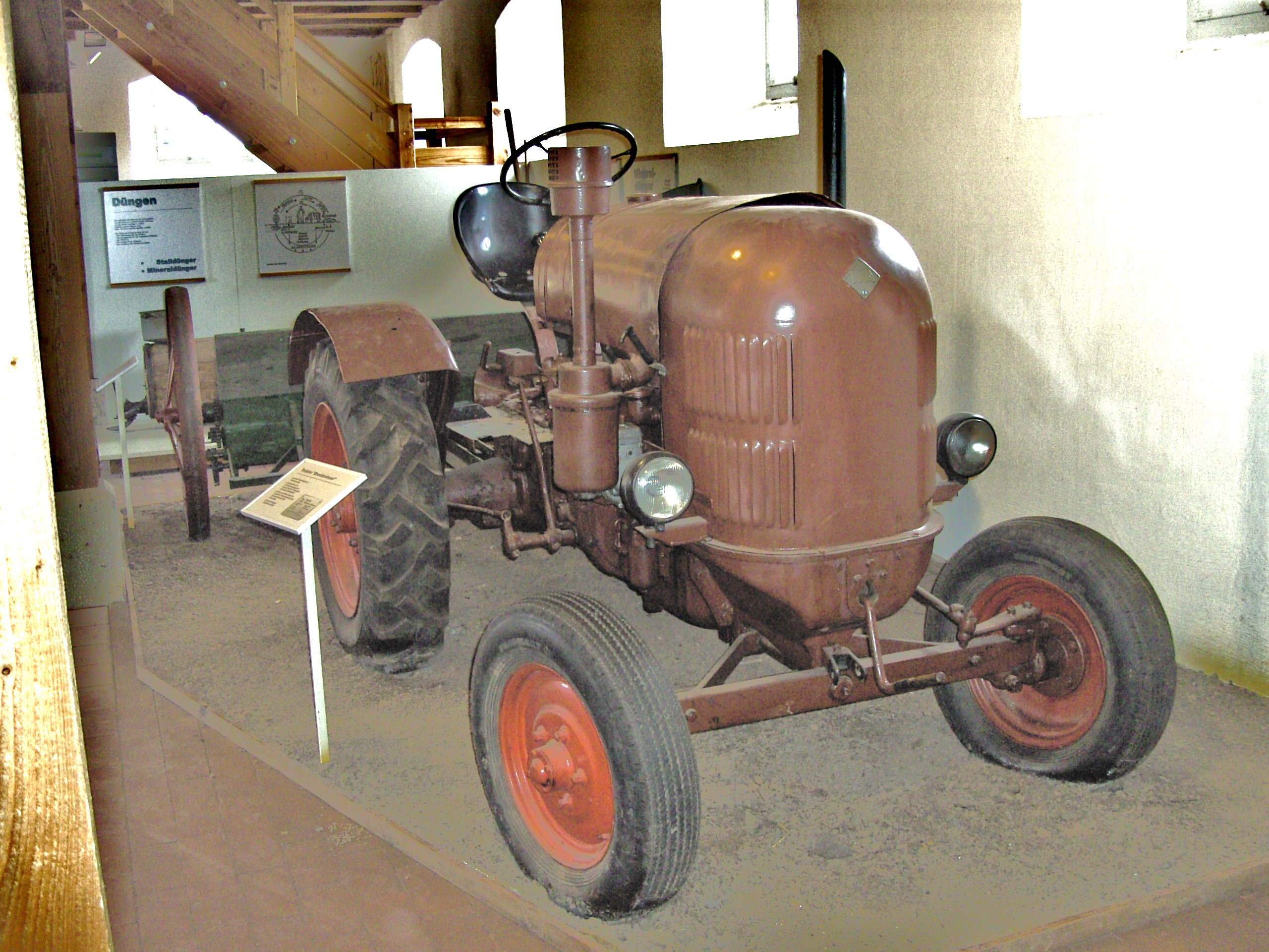 Traktor des VEB Schlepperwerke Nordhausen mit 22 PS, gebaut in Blockbauweise von 1949 bis 1952